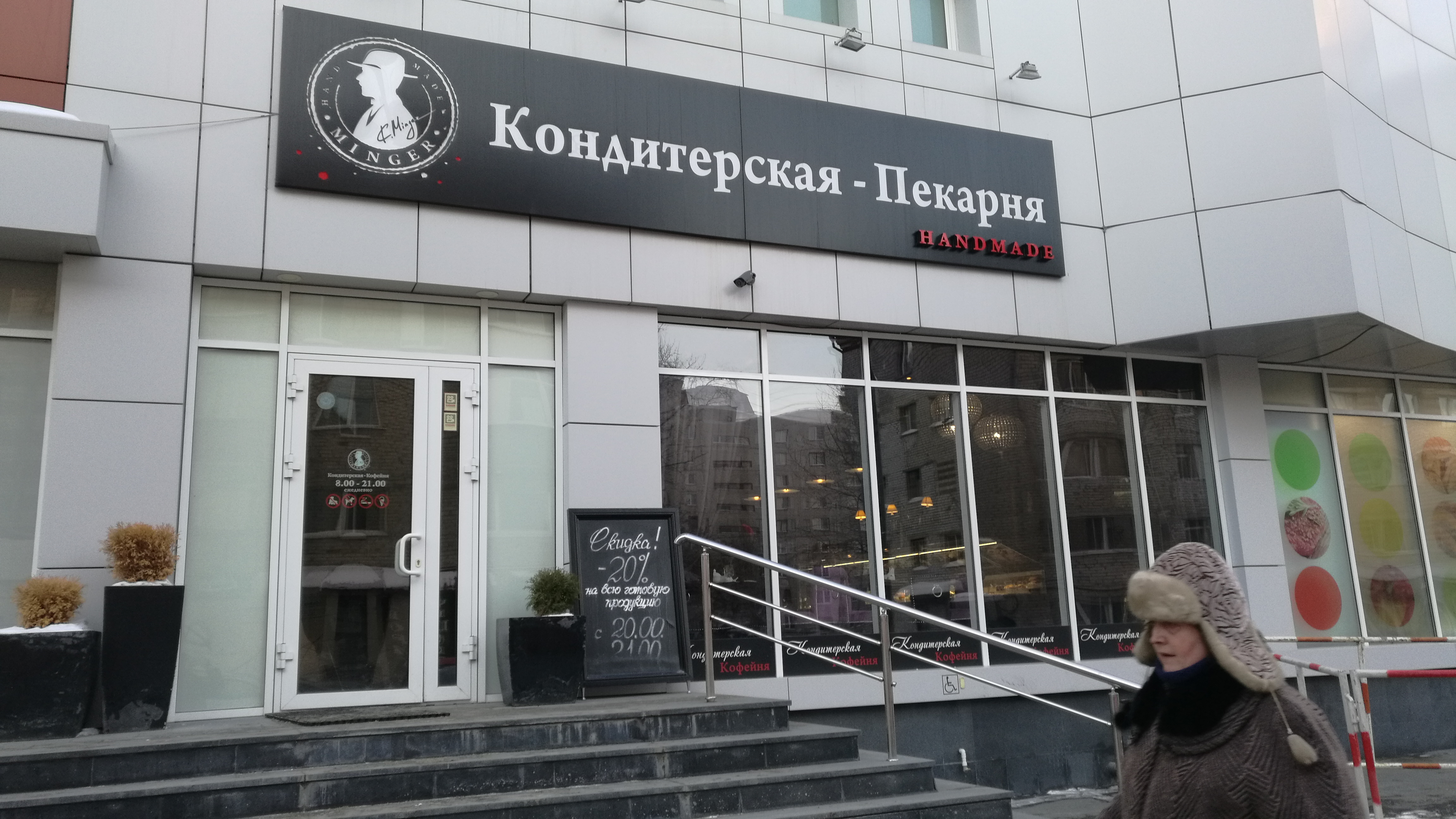 Bakejo en loĝdomo en strato Fabriĉnaja, 9. Tjumeno, Rusio.